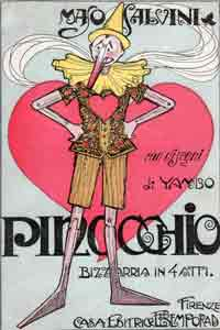 Copertina di Pinocchio, bizzarria in 4 atti (1919) di Maso Salvini e illustrato da Yambo.